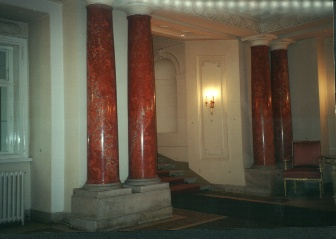 Modena_1